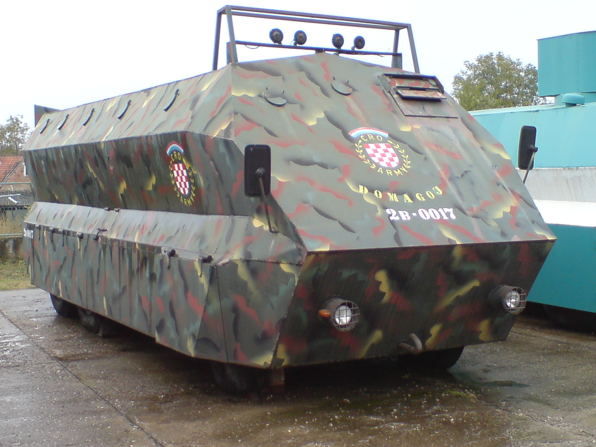 Oklopnjak u vukovarskoj vojarni